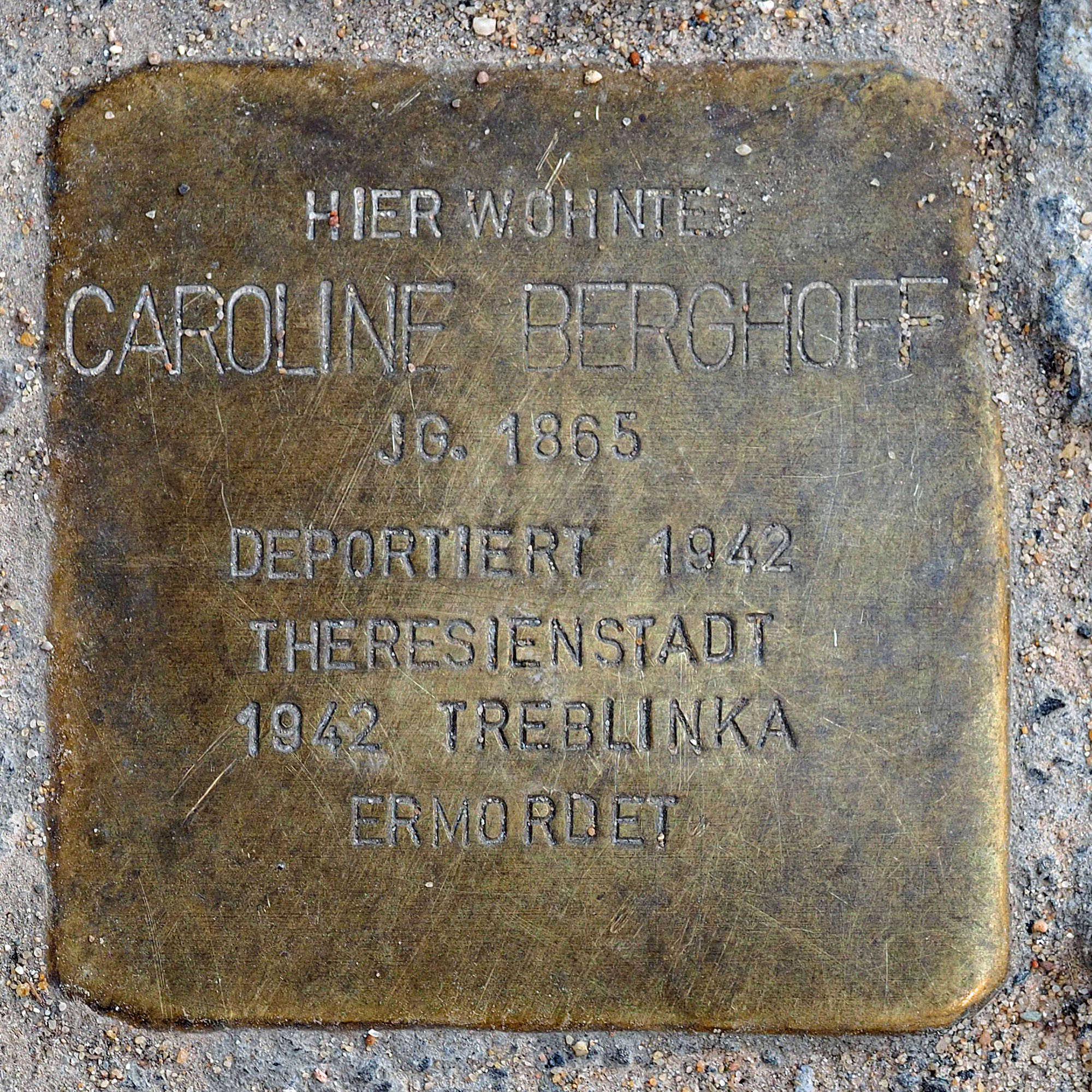 Stolpersteine in Kempen: Caroline Berghoff, Engerstraße 38